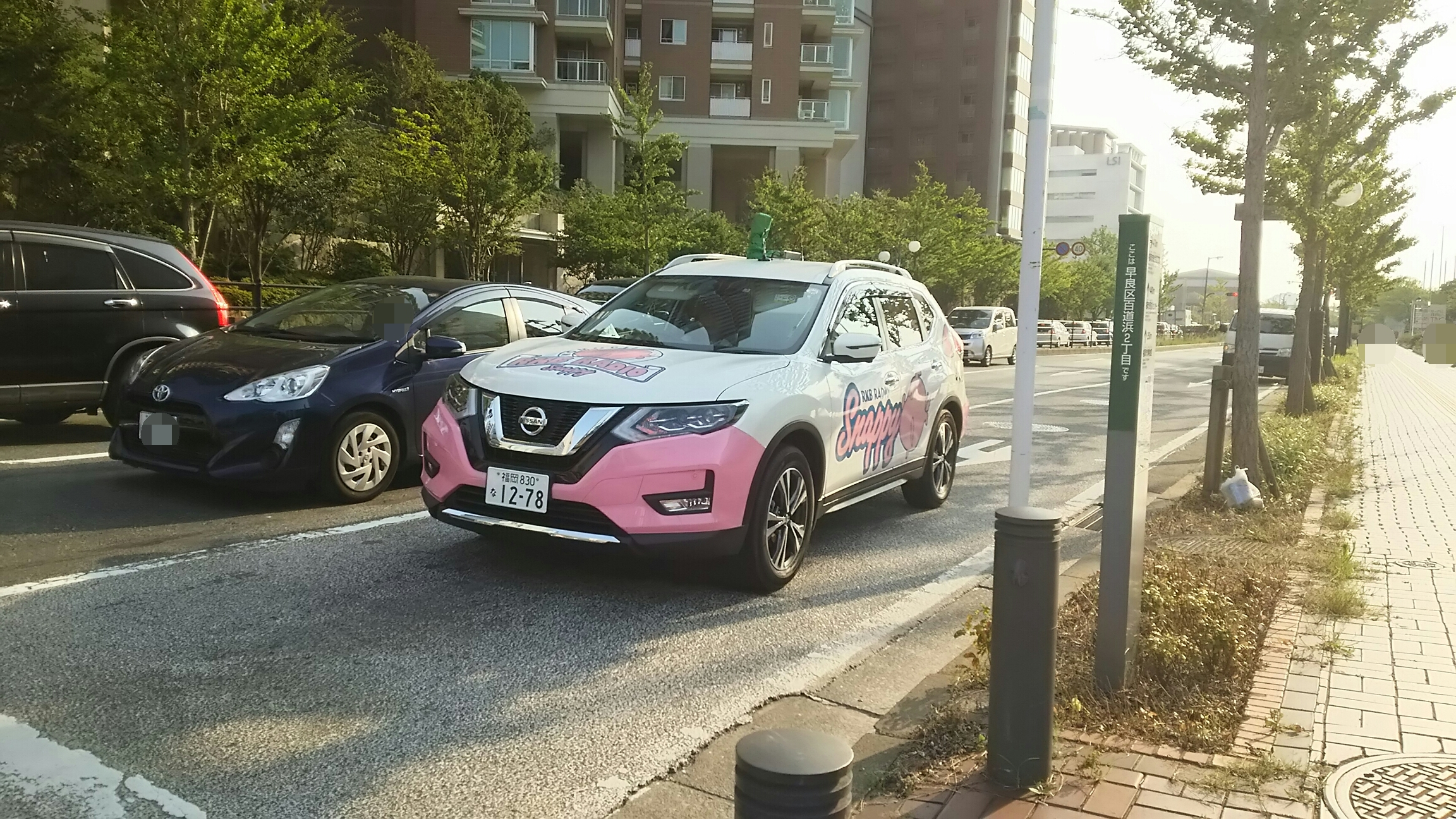 2018年7月16日に福岡市早良区百道にて撮影。